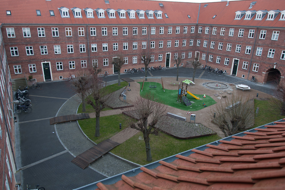 Meget atypisk for boligkarreer er opgangenes hoveddøre placeret ind mod gården. Ringen af elmetræer har overlevet flere gårdrenoveringer, senest i 2011, hvor hele overfladen blev ryddet, og faskiner til opsamling af overfladevand blev gravet ned. Opført: 1921 Arkitekt: Johannes Henning Hansen